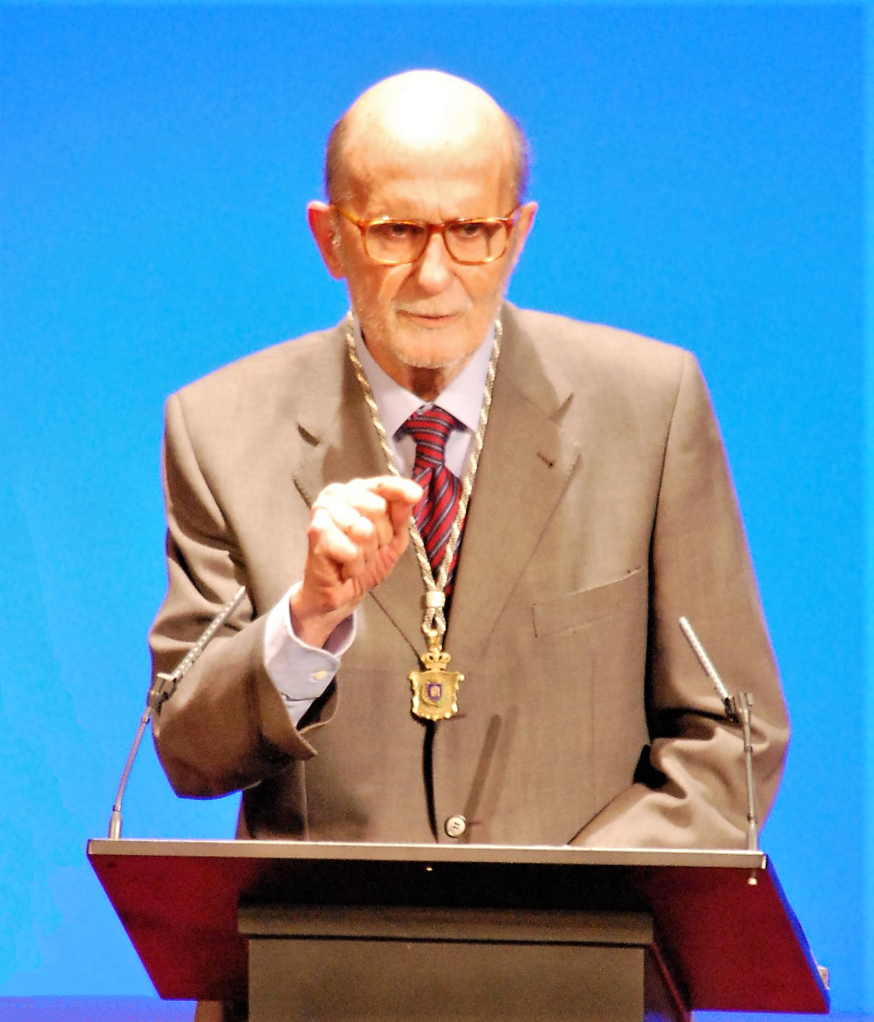 Arsenio Lope Huerta en el acto donde recibió la Medalla de oro de la ciudad de Alcalá de Henares (Comunidad de Madrid - España) el 27 de febrero de 2020 en el Teatro Salón Cervantes.